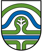 Grb Občine Cerknica Avtor redesigna Jan Petrič julij 2009